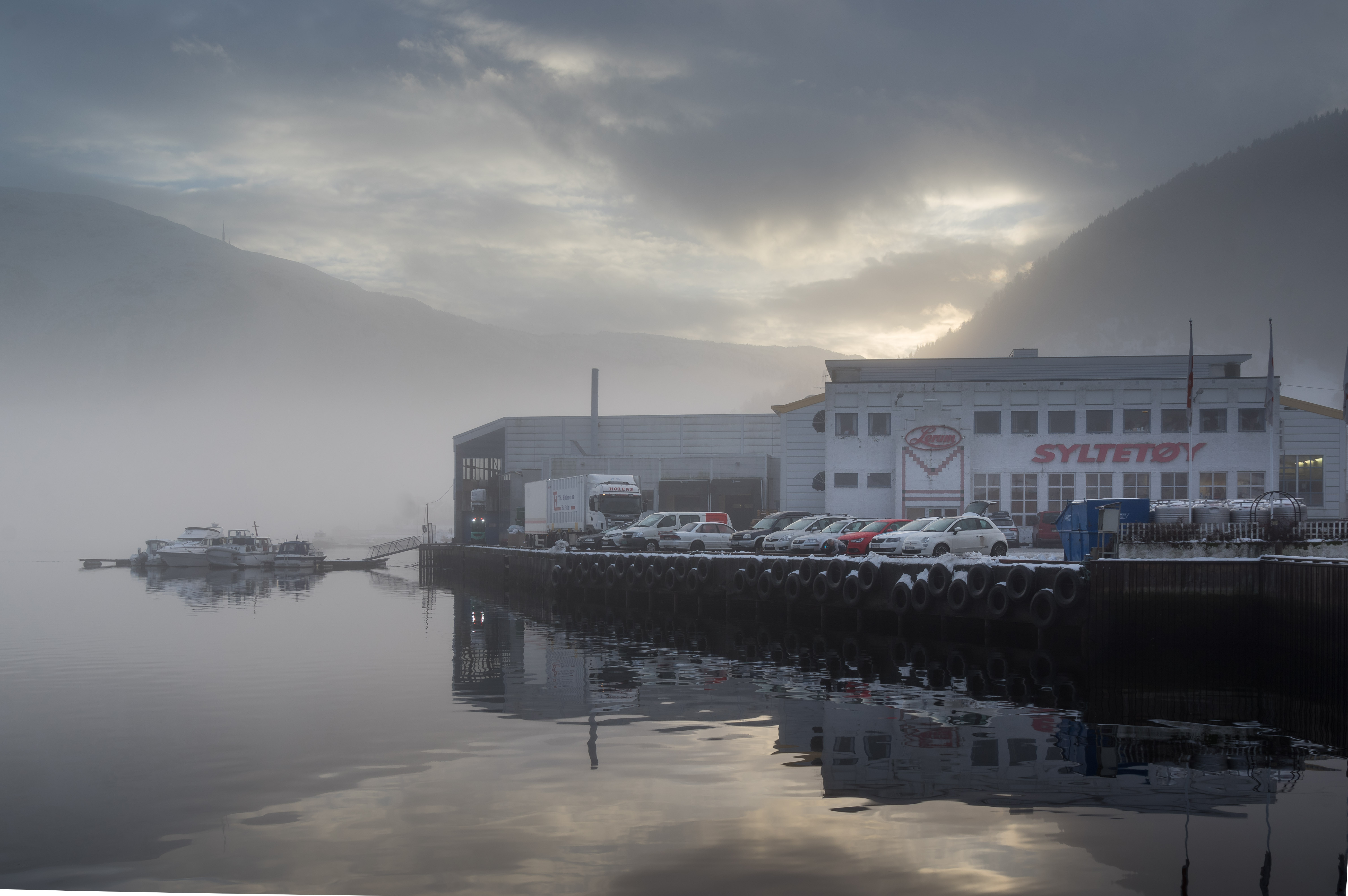 Lerum syltetøyfabrikk i Sogndal i 2017.